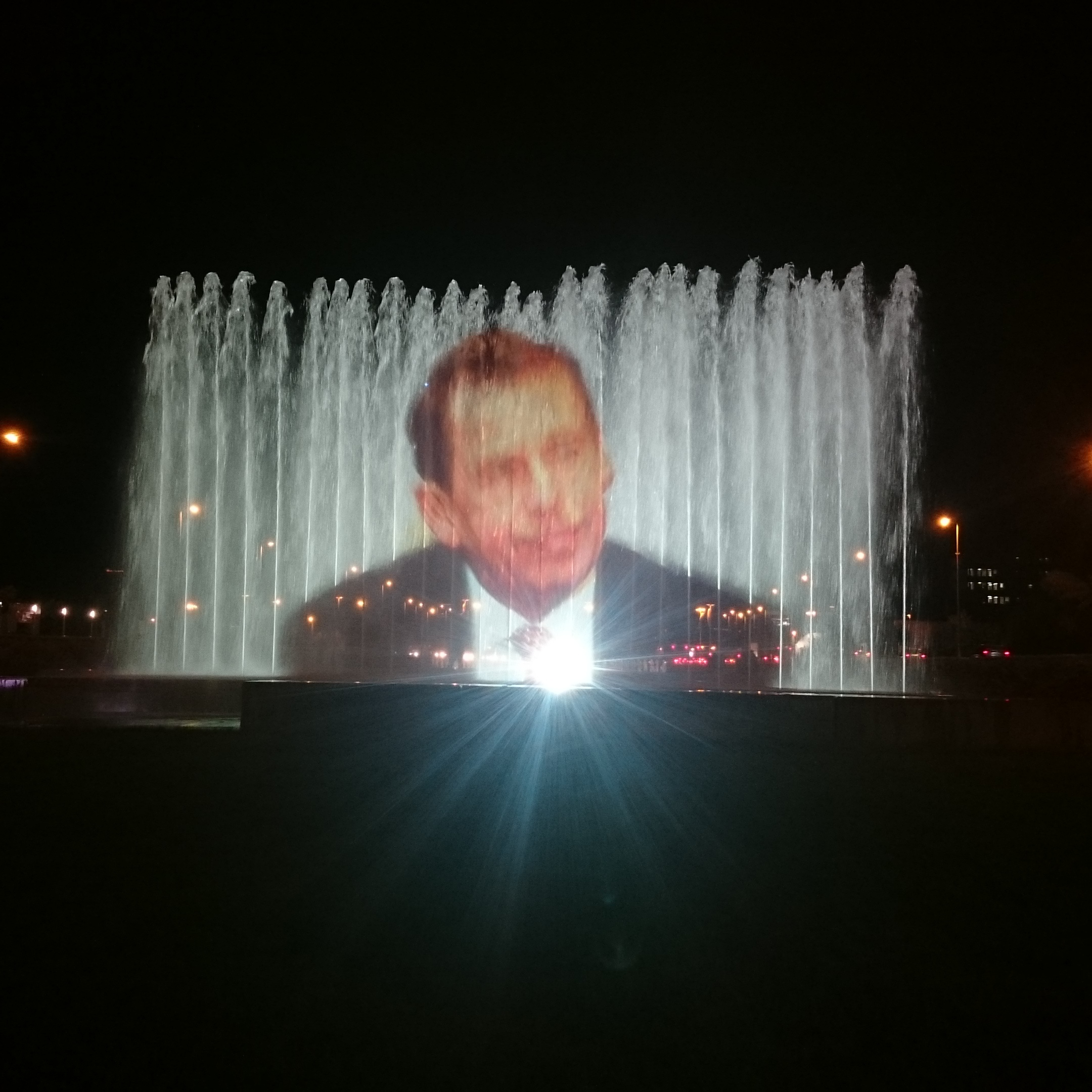 Lik Vaclava Havela na fontani kod NSK u Zagrebu 2016. uoči Havelovog 80. rođendana